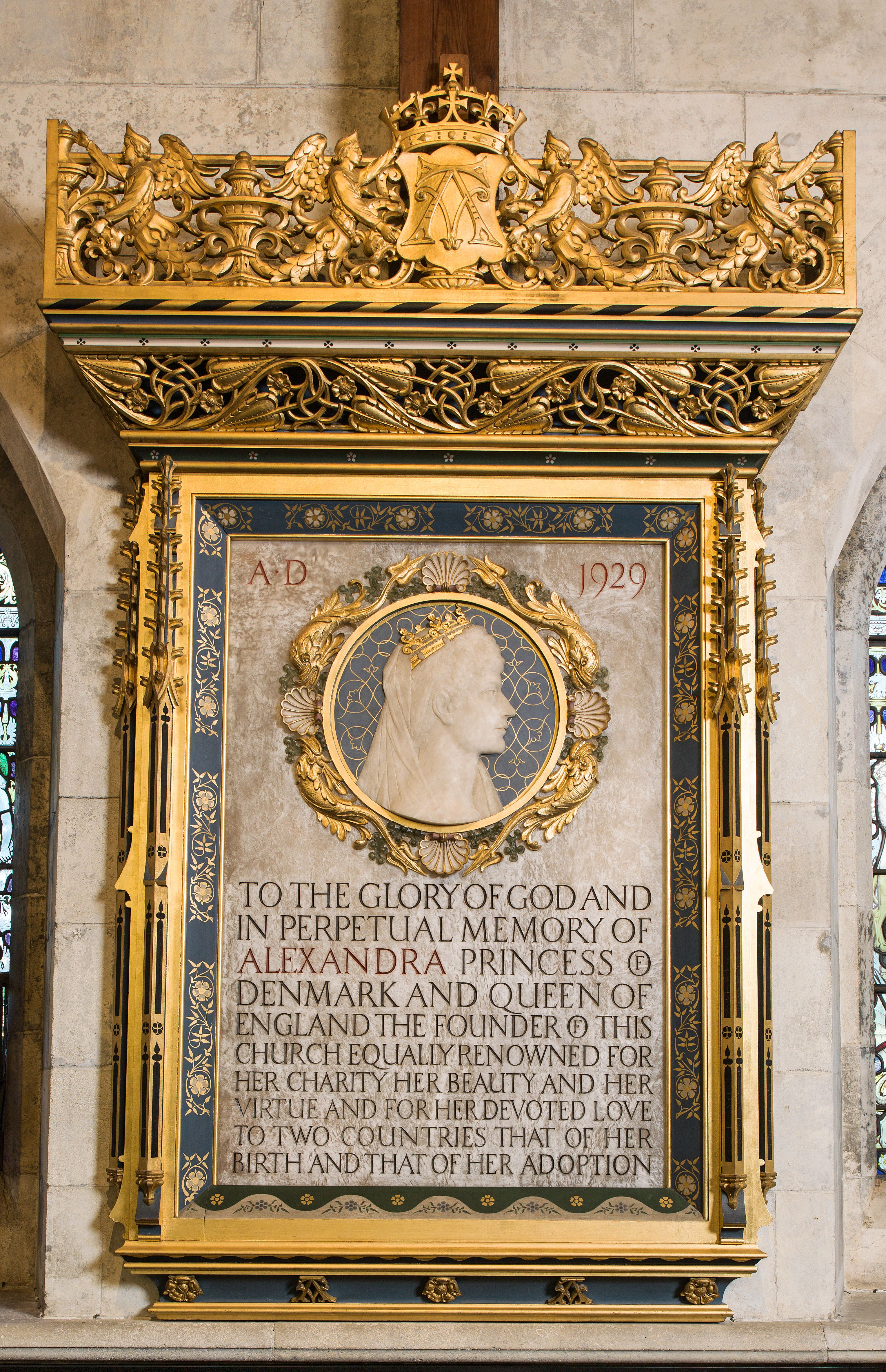 Saint Albans Church, mindetavle for Alexandra, efter konservering. Konserveringsarbejdet er beskrevet i rapport; sagsopgavenr. 11021409 og 11021492, sagsnr. 2012-020684.. Den engelske kirke